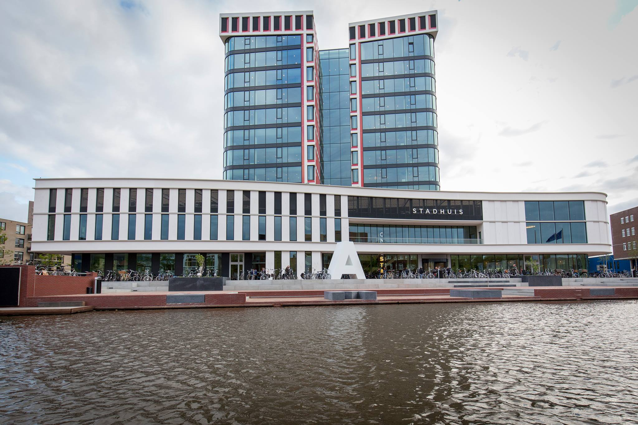 Het nieuwe stadhuis van Almelo